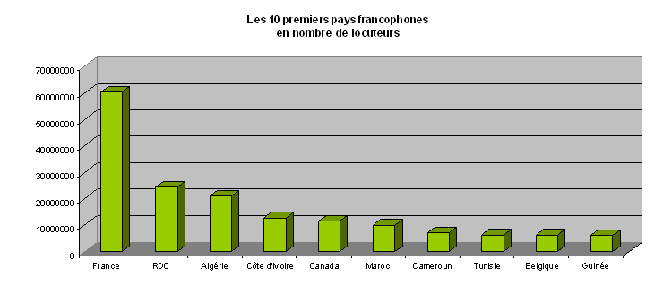 Les dix premiers pays en nombre de locuteurs du français en 2005 selon publié par l'OIF. Francophones réels et partiels inclus